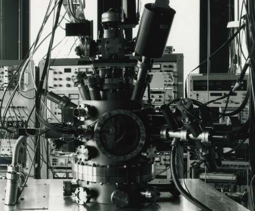 Apparatur für die inverse Photoemission